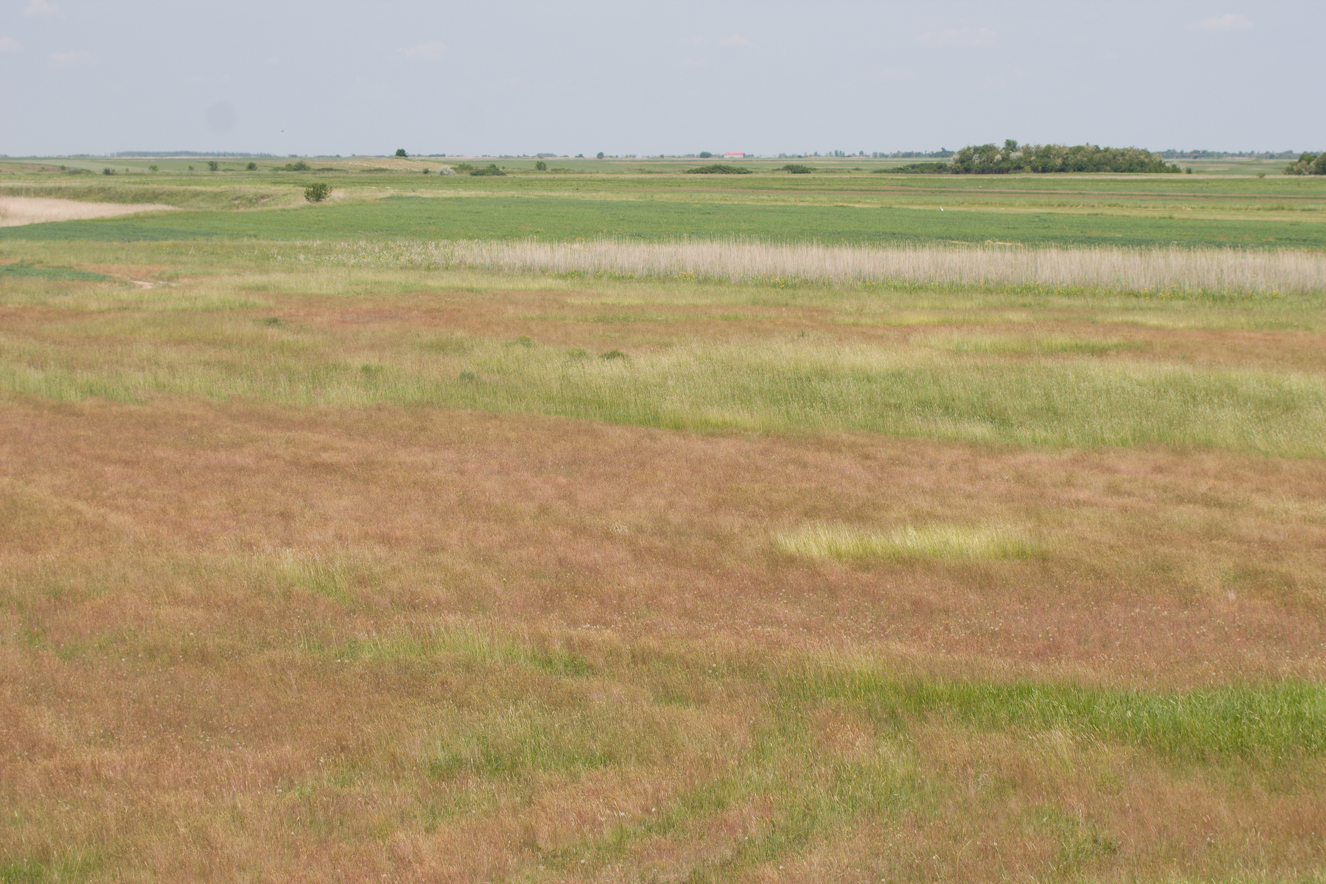 Slatinska livada sa tipičnom slatinskom vegetacijom.